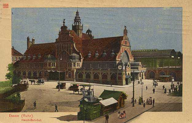 Hauptbahnhof Essen (Ruhr)